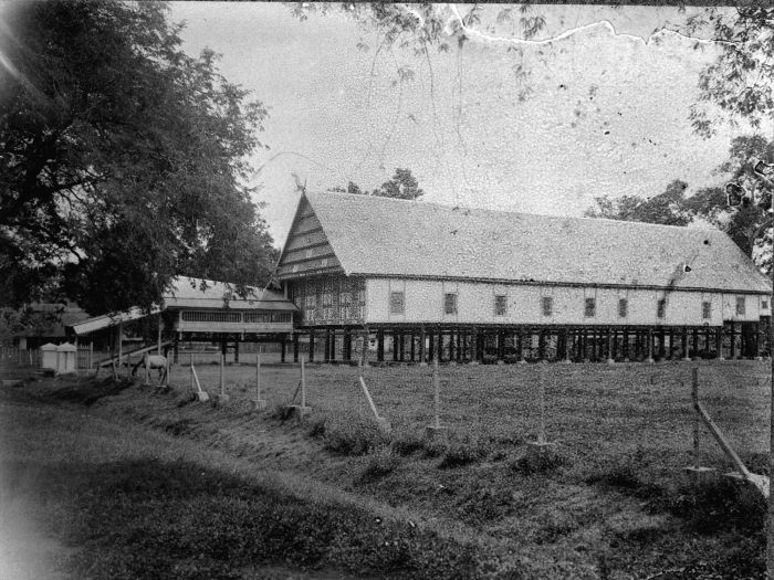 Foto. Militaire Exploratie van Nederlands Nieuw-Guinea 1907-1915. Paleis van de vorstin van Bone op Celebes